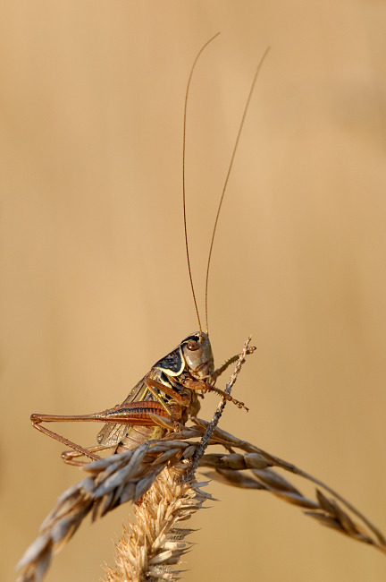 Pilt Marek Kolgi fotokogust. Rohutirts